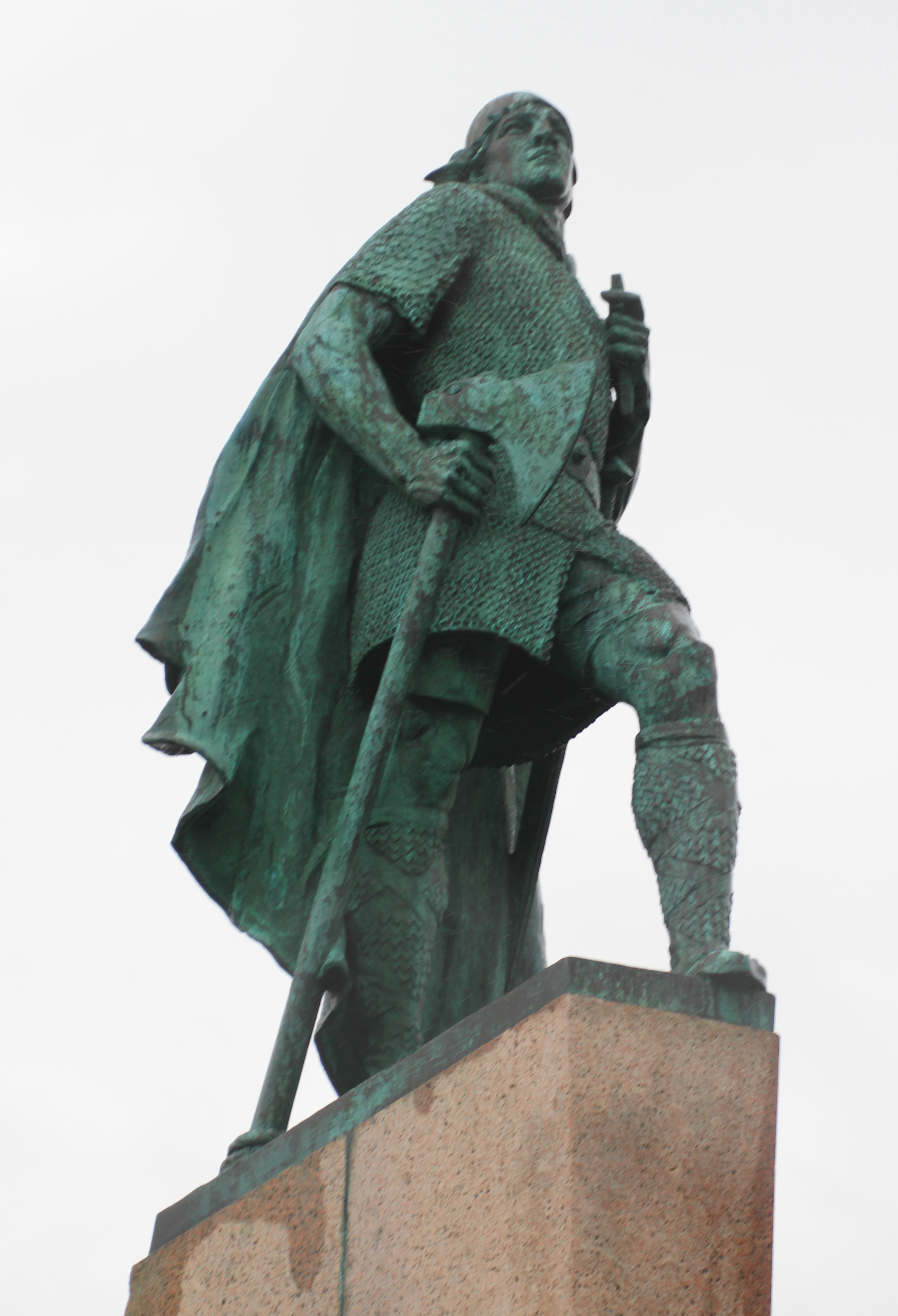 Reykjavík, Leifur Eiriksson (1932) by Alexander Stirling Calder (1870–1945)